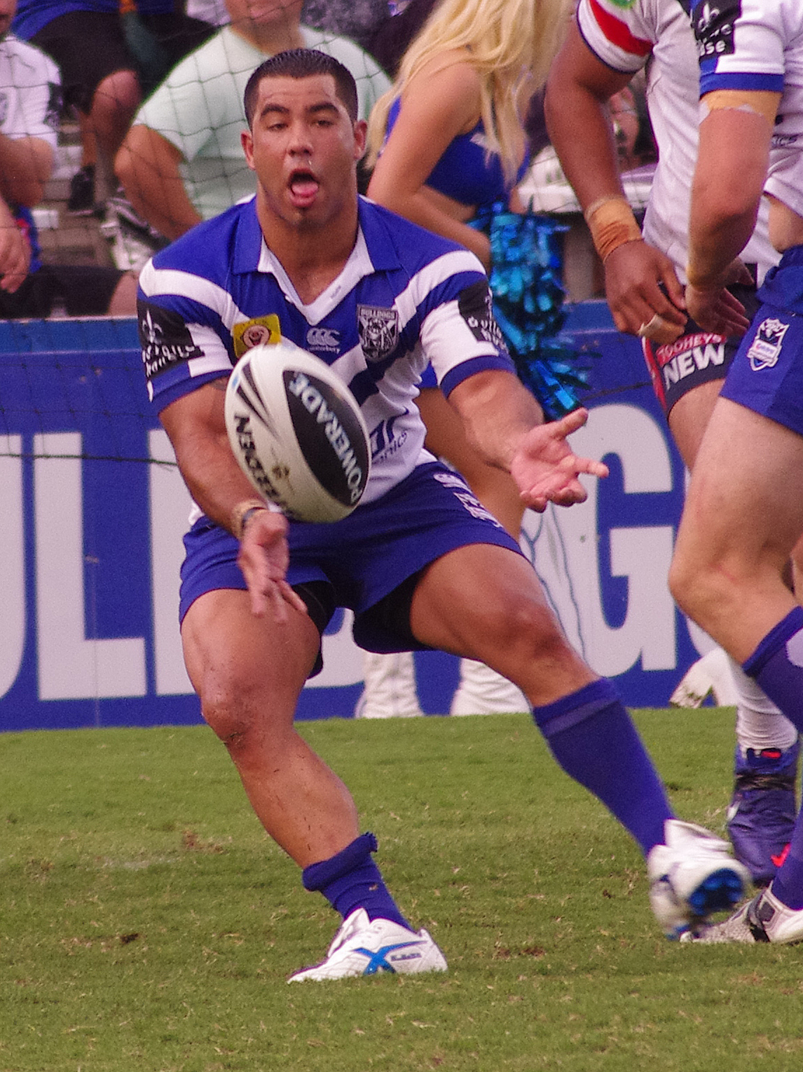 Joel romelo